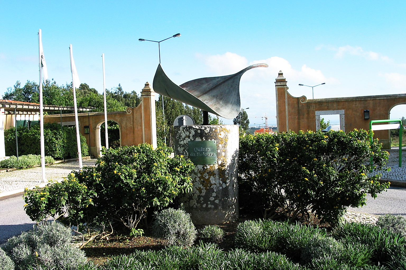 December 2002